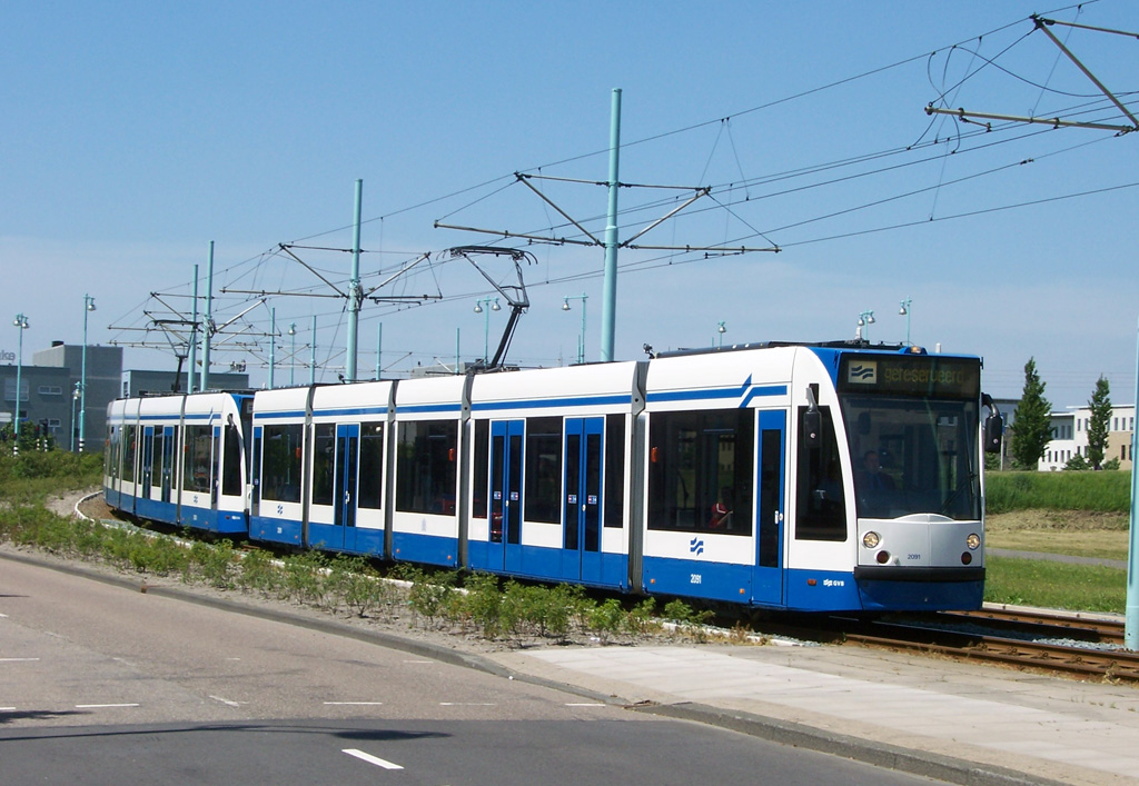 2x Combino's van GVB Amsterdam in dubbeltractie. In de normale dienst worden deze trams niet in dubbeltractie ingezet.